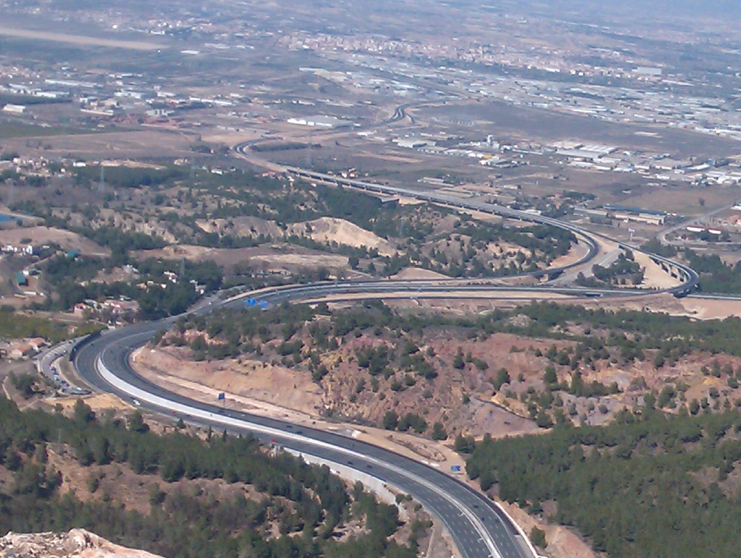 La autovía A-30 y la MU-31 vista desde el Castillo de la Asomada